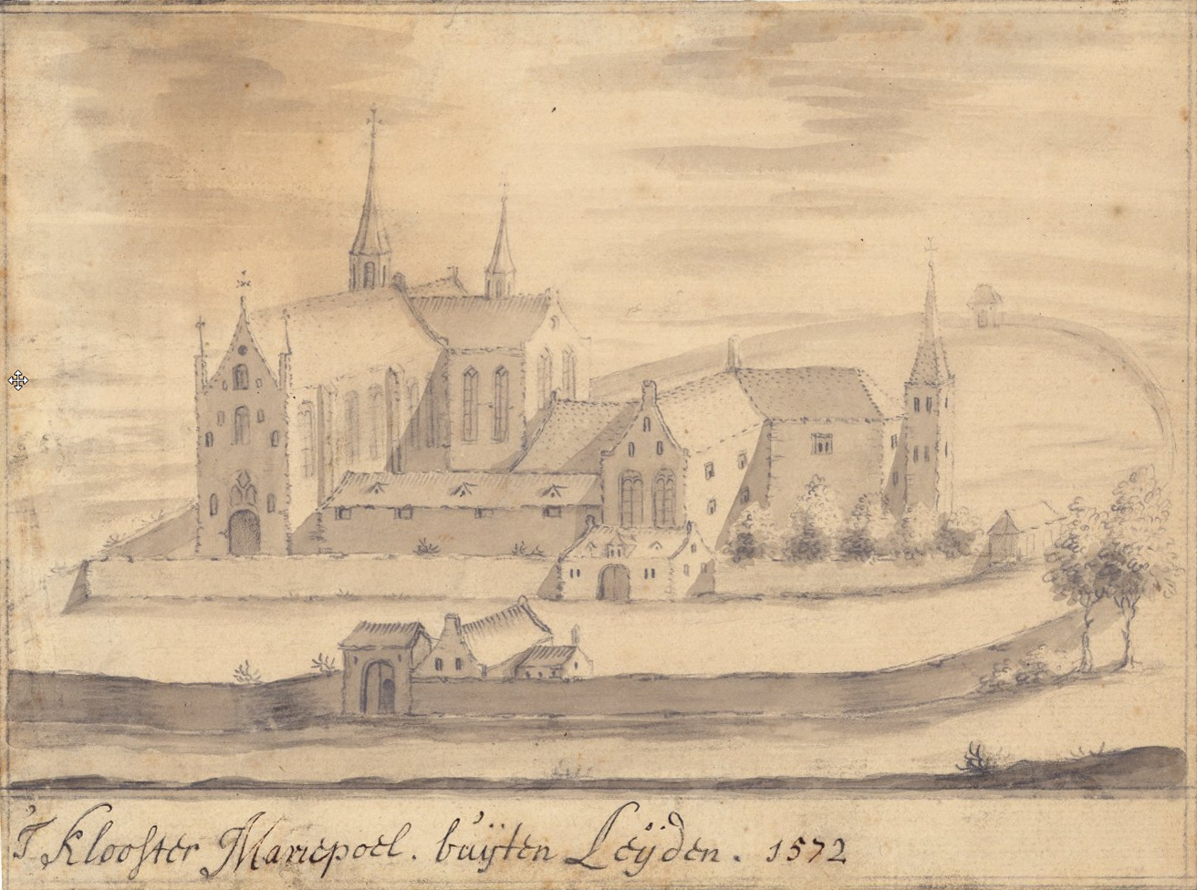 Gezicht op klooster Mariënpoel, gelegen nabij de huidige Wassenaarseweg te Leiden. Tekening in potlood en O.I. inkt uit 1572. Maker onbekend.